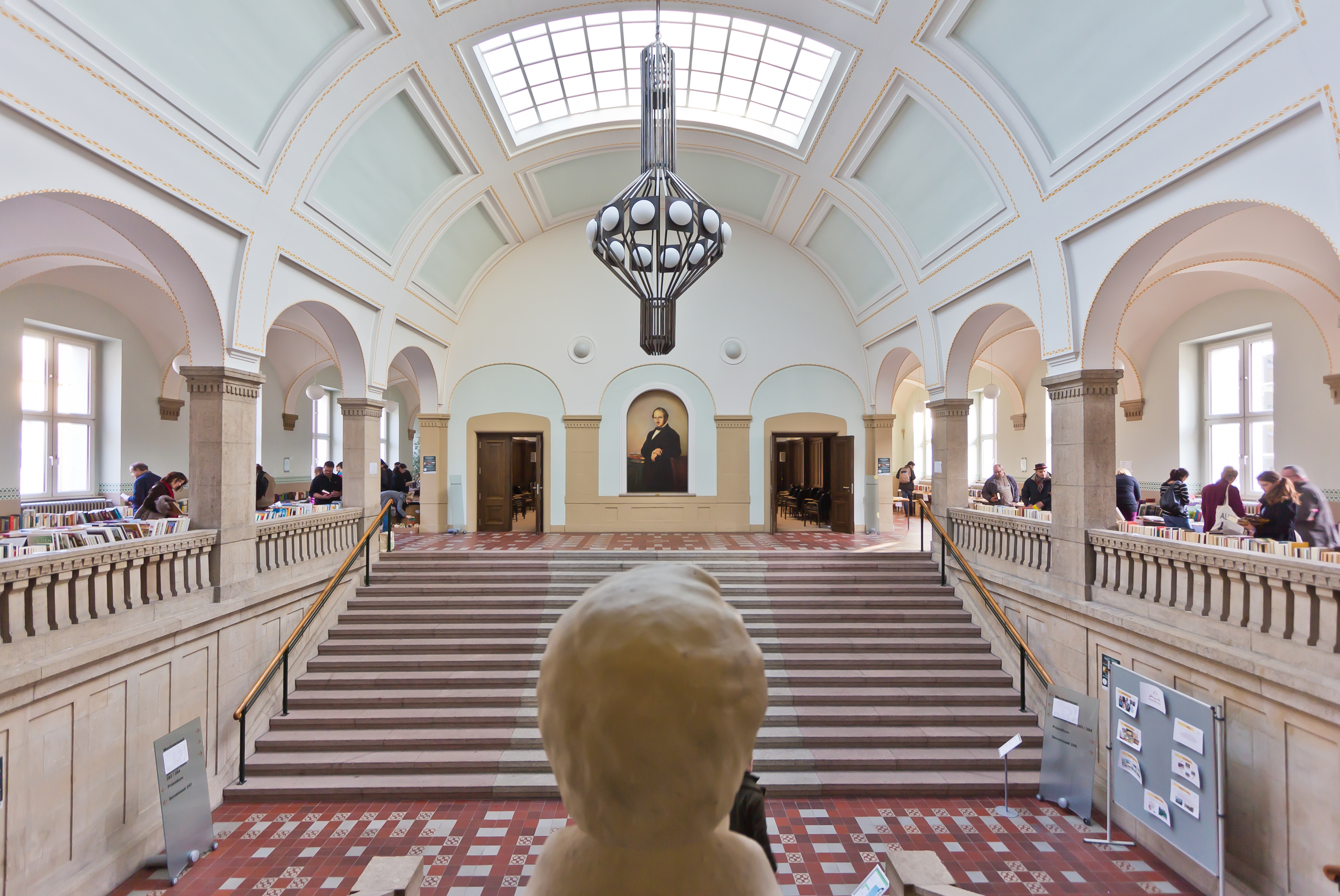 Gebäude der Alten Universität, Claudiusstr. 1, Köln. Heutige Nutzung: Fachhochschule Köln - Campus Südstadt, GWZ Foto: zentrales Treppenhaus